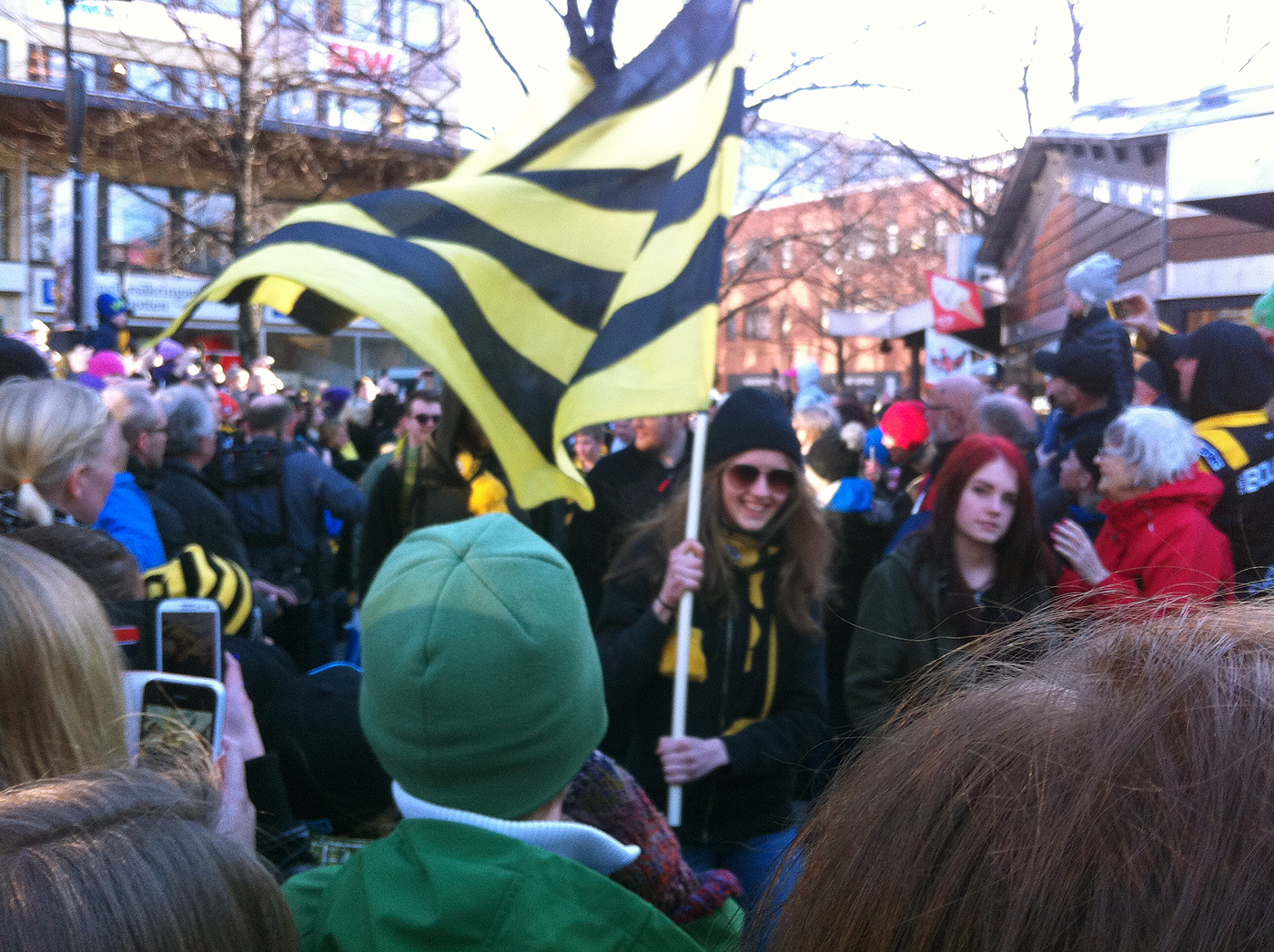 North Powers medlemmar leder segertåget med Skellefteå AIK efter SM-segern. Möjligheternas torg, Skellefteå april 2014.